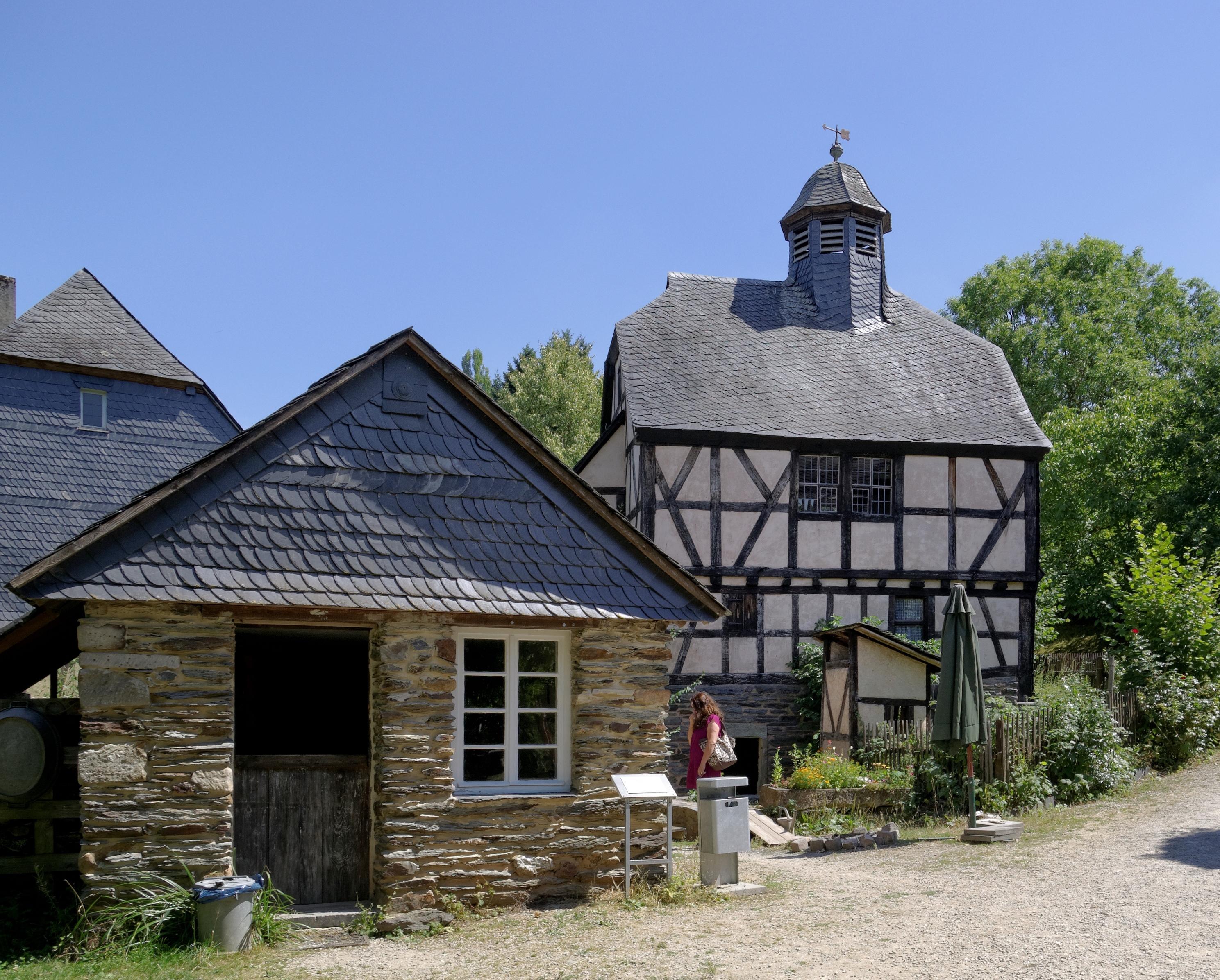 Roscheider Hof, Hunsrückweiler, Backhaus aus Oberkleinich (links) und Dorfrathaus aus Gödenroth (rechts)